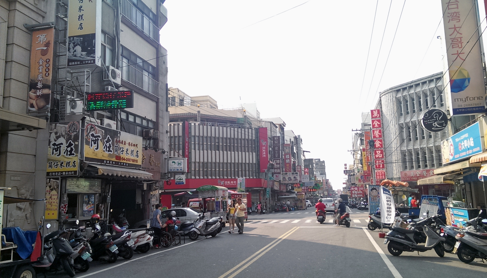 大甲區蔣公路